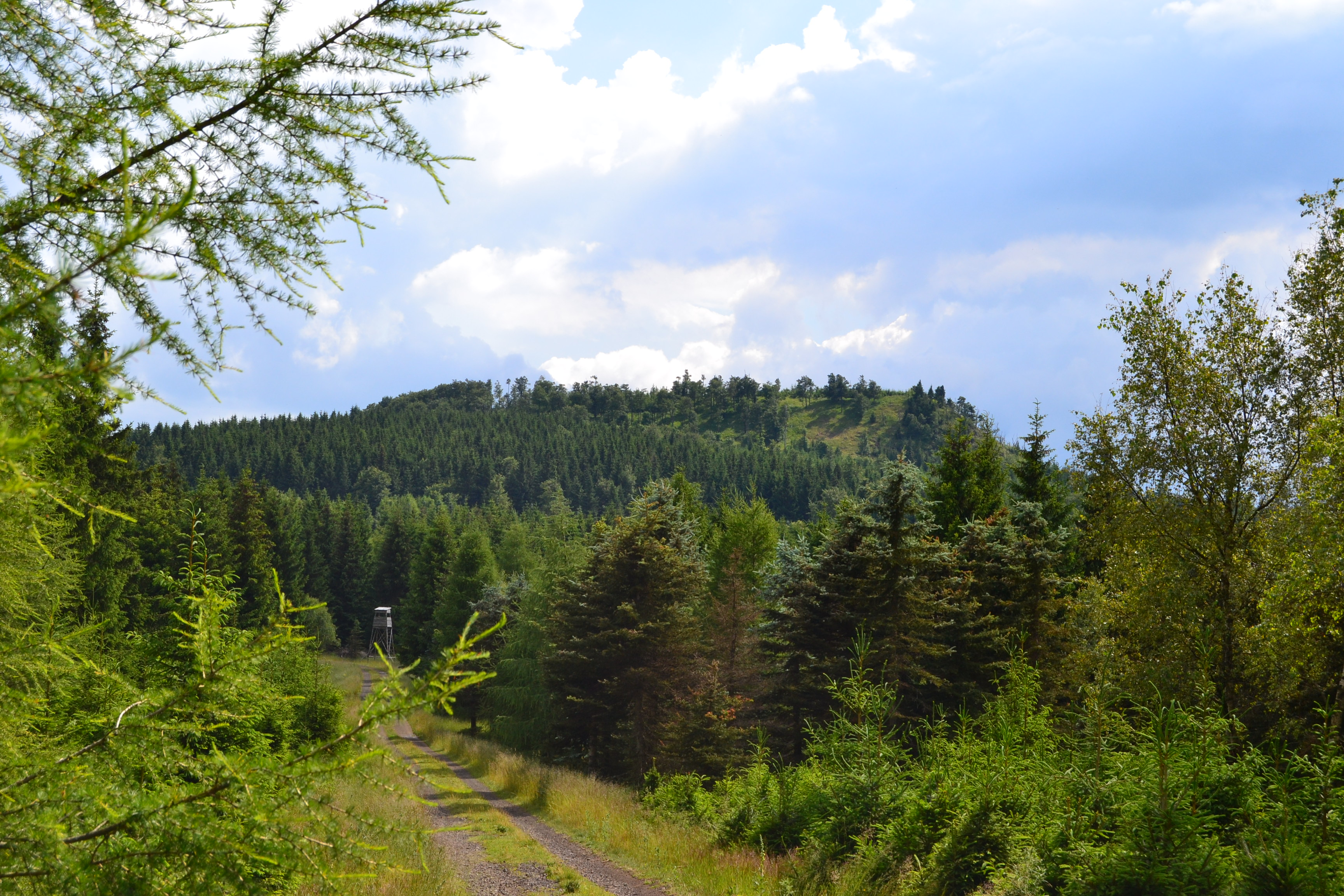 Der Jelení hora (994 m n.m) im Mittleren Erzgebirge von Norden gesehen.